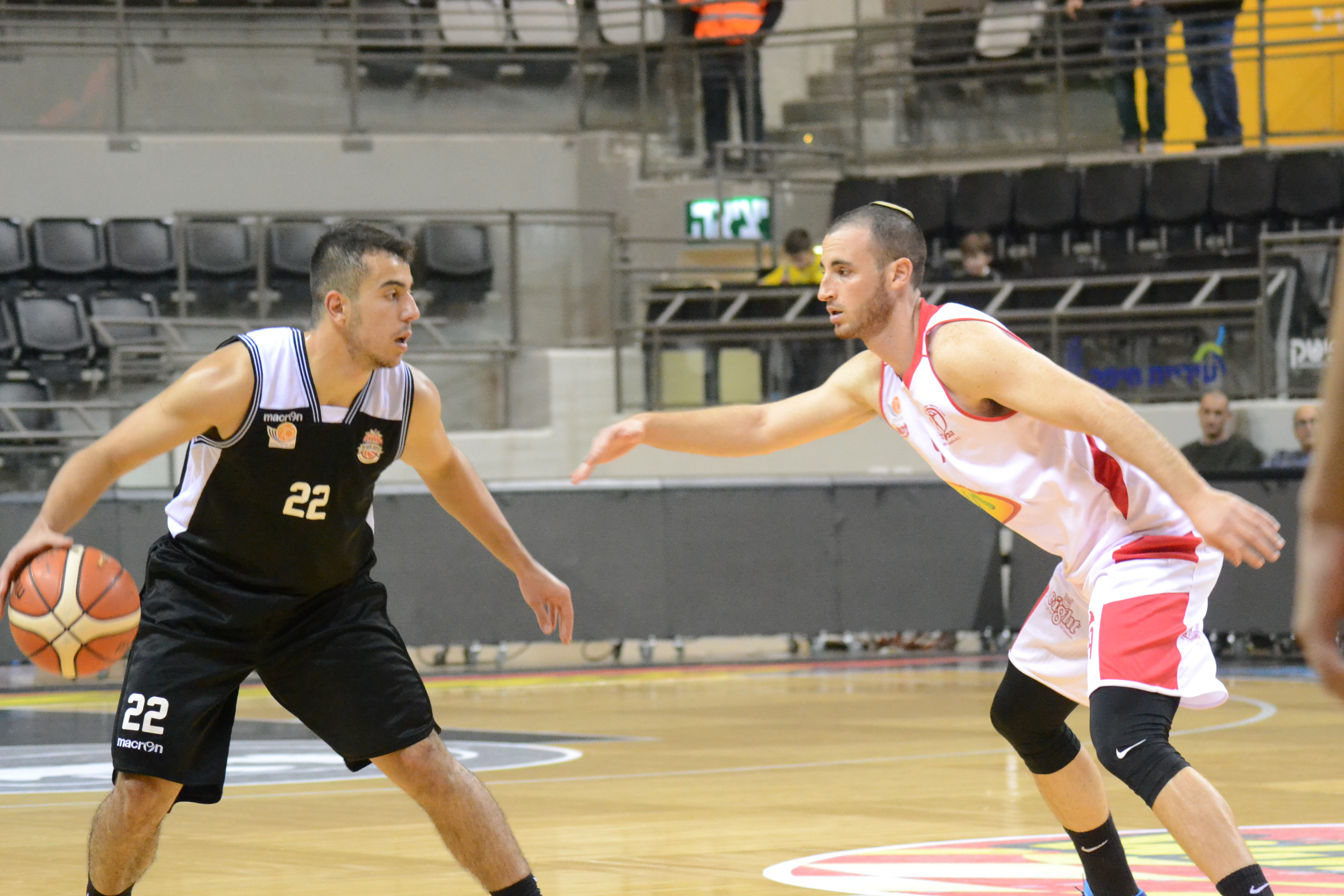 רמת השרון במשחק נגד הפועל חיפה במסגרת הליגה הלאומית 2016